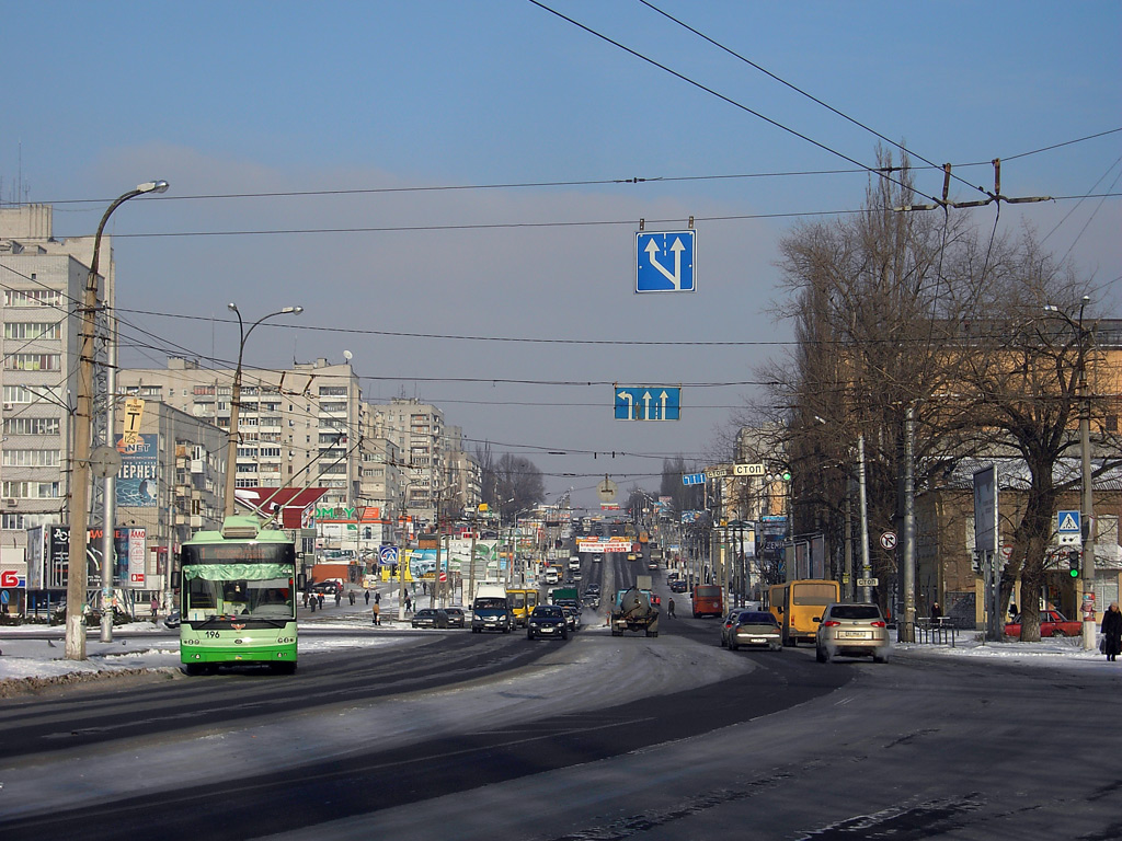 Троллейбус Богдан Т601.11 на улице Кременчуга